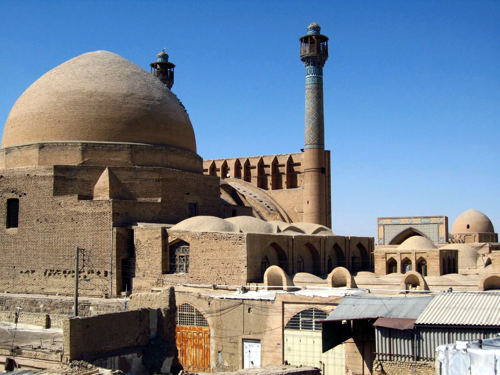 Jameh Mosque (Friday Mosque), Isfahan, Iran